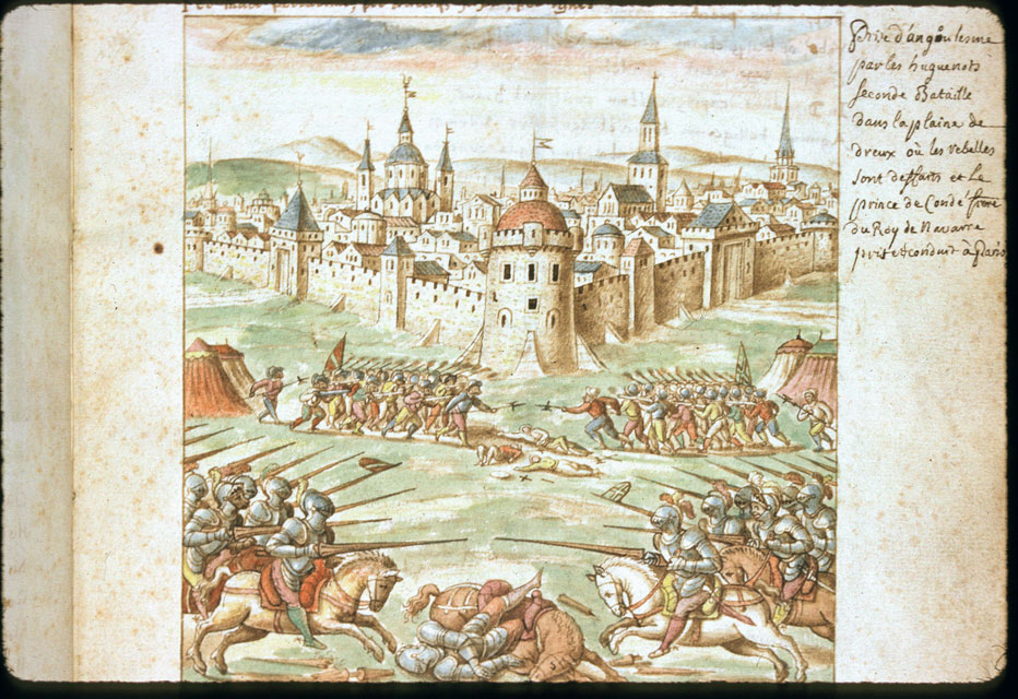 bataille de Dreux (1562), Eure-et-Loir, France.